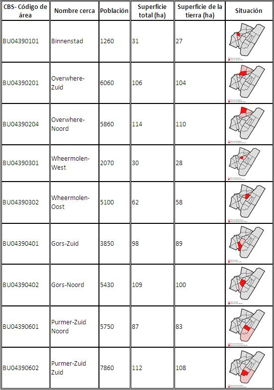 Barrios en Purmerend, information